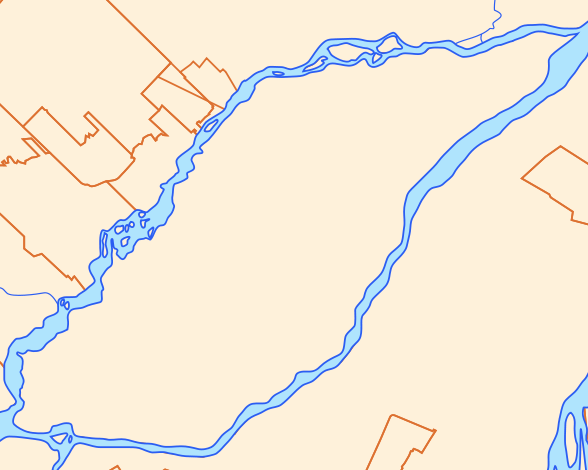 Carte de Laval, Québec